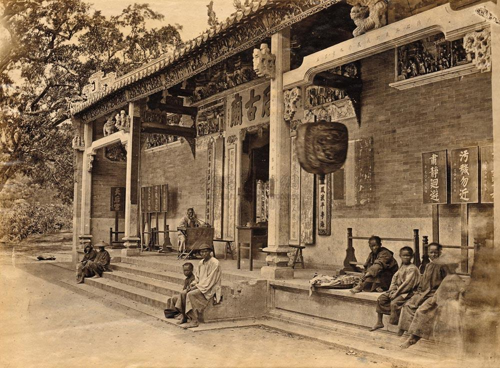 Tin Hau temple